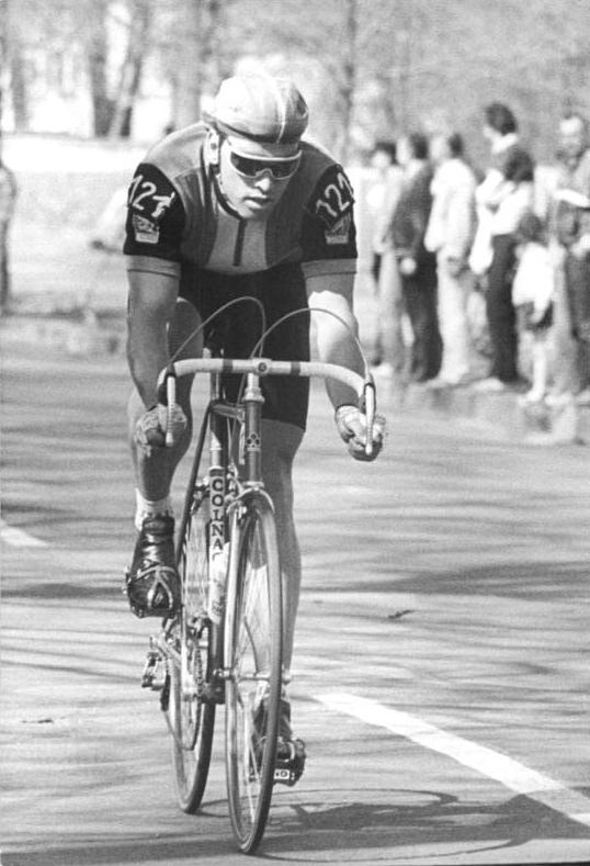 Olaf Ludwig ADN-ZB Gahlbeck 22.4.88-A-Leipzig: Das Radrennen Dresden - Leipzig über 168 Kilometer - ausgetragen auf der Strecke der 1. Etappe der 41. Friedensfahrt 1988 - gewann Olaf Ludwig. SG Wismut Gera.